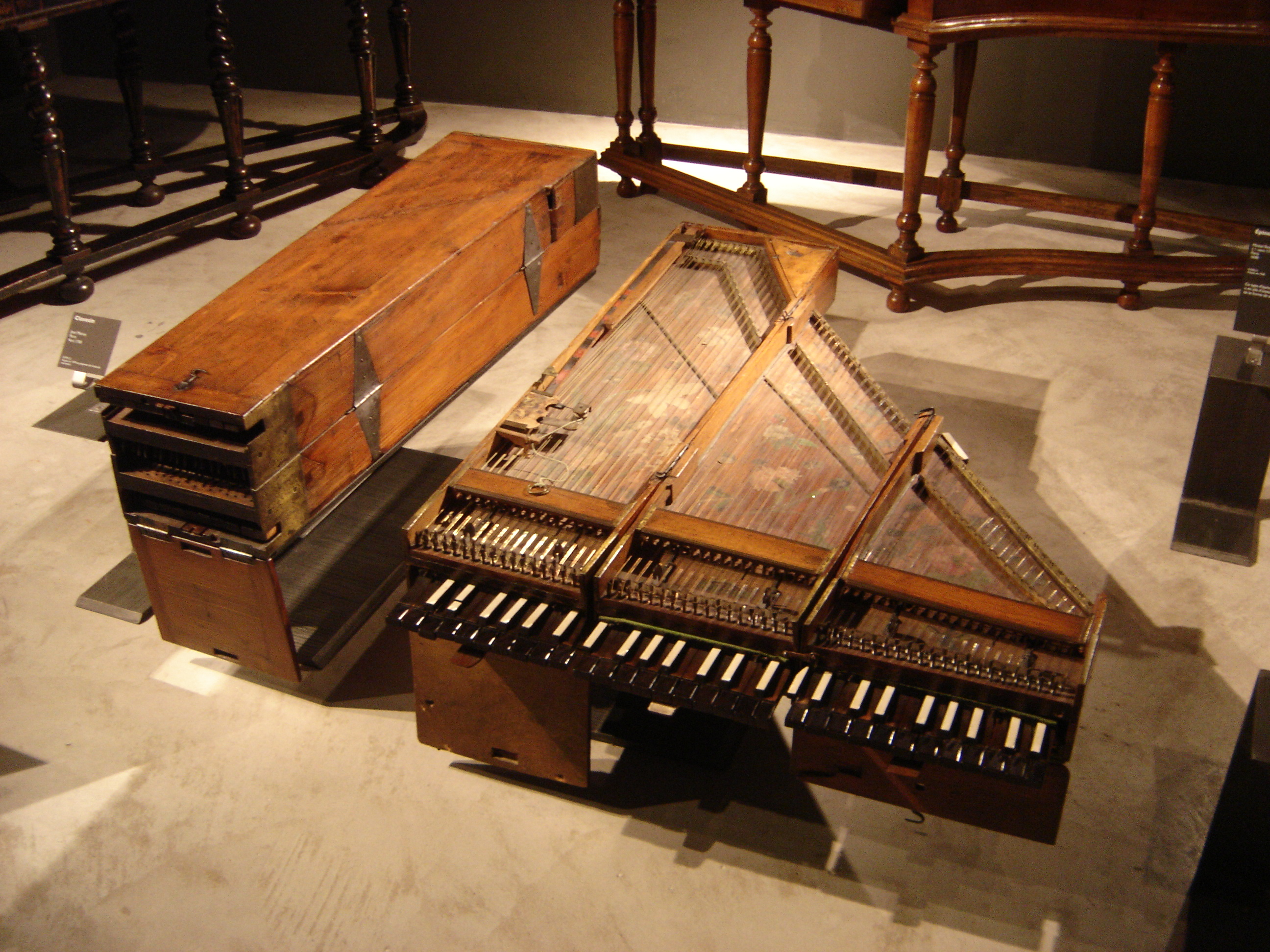 Deux « clavecins brisés » par Jean Marius (Paris, 1700) - A droite, le clavecin ouvert, à gauche le clavecin replié - Paris, Musée de la Musique